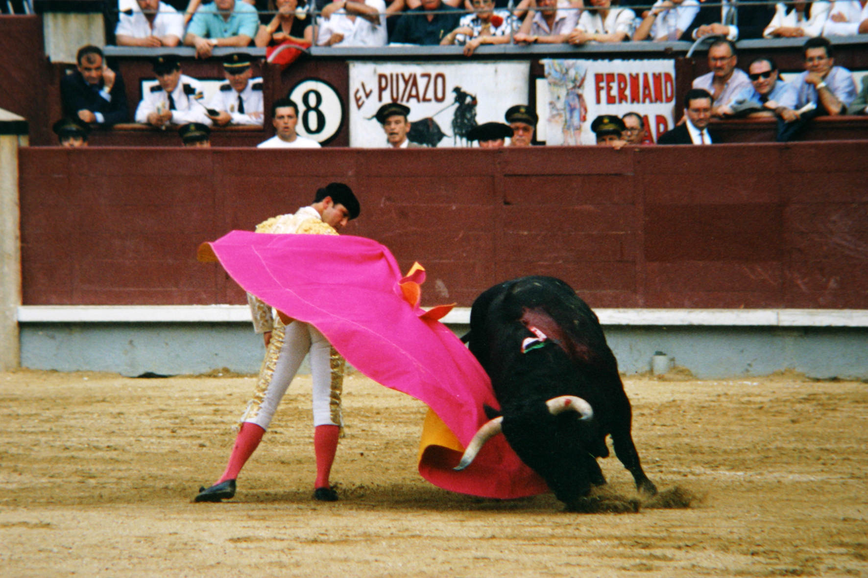 Larga cordobesa de César Rincón en Madrid, al toro Bastonito de Baltasar Ibán, el 7 de junio de 1994.